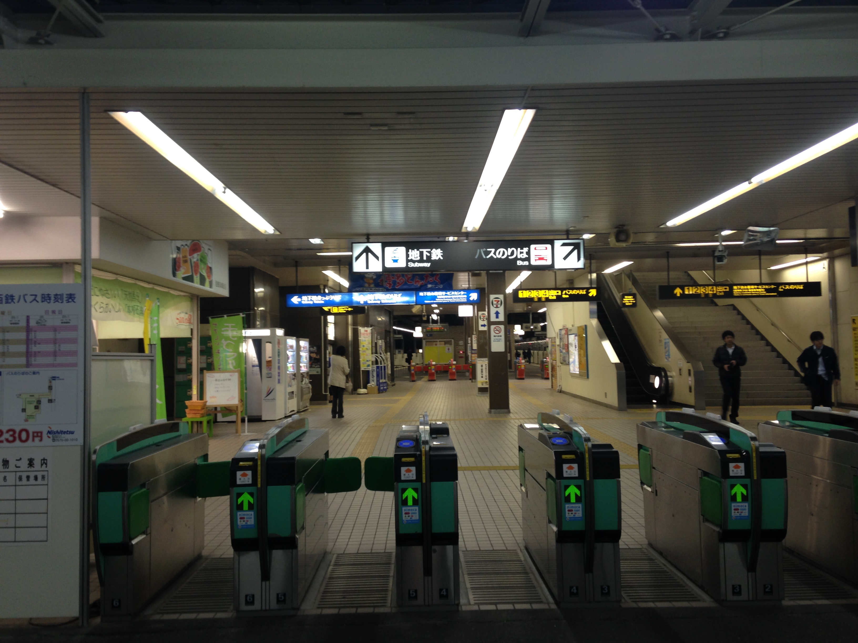 西鉄側より望む貝塚駅構内